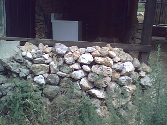 קיר של אבן לקט , חוות יערן 2008